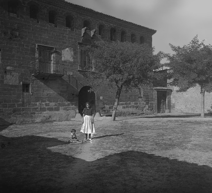 A la Granja d ' Artesa de Segre. Josep Salvany i Blanch (1922)